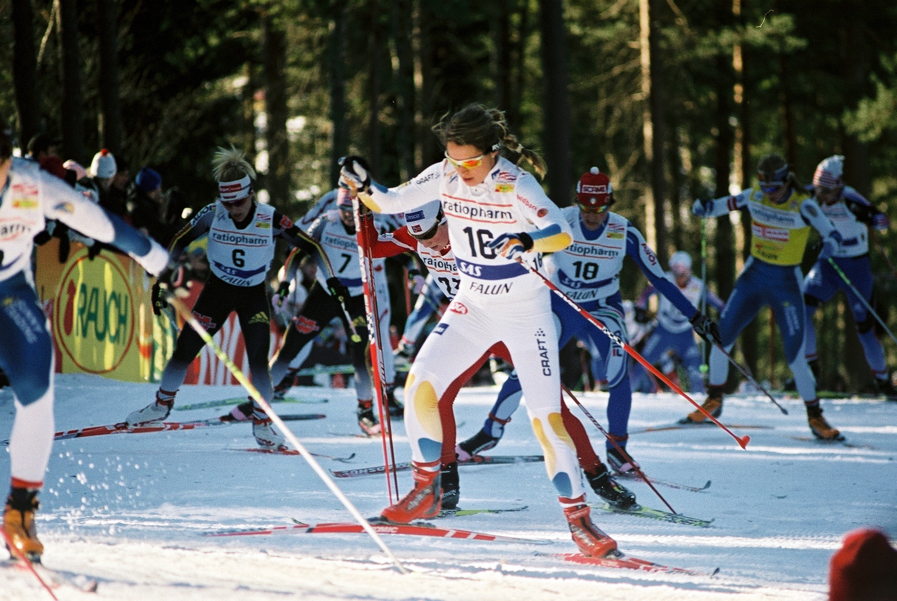 A248939 032A